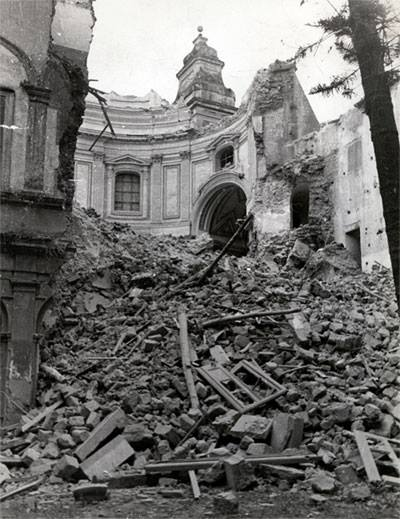 Napoli - La chiesa di S. Sebastiano, ora distrutta e scomparsa, la cui facciata si ergeva in fondo al cortile del Liceo Vittorio Emanuele II, dopo il crollo della cupola dovuto ad un collasso strutturale avvenuto nella notte tra il 5 e il 6 maggio del 1941, fu del tutto demolita negli anni '50 e '60 del '900.